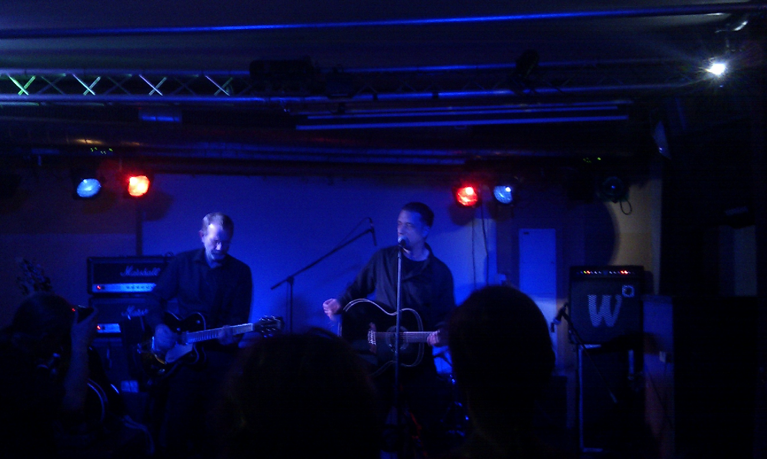 Die deutsche Band Beringsee bei einem Auftritt im Studentenclub "Schütze" in Weimar (Thüringen)